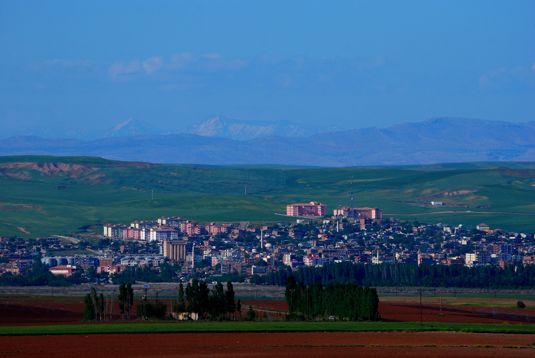 Kurdî: Ji Melemûs ve hstiye kişandin.